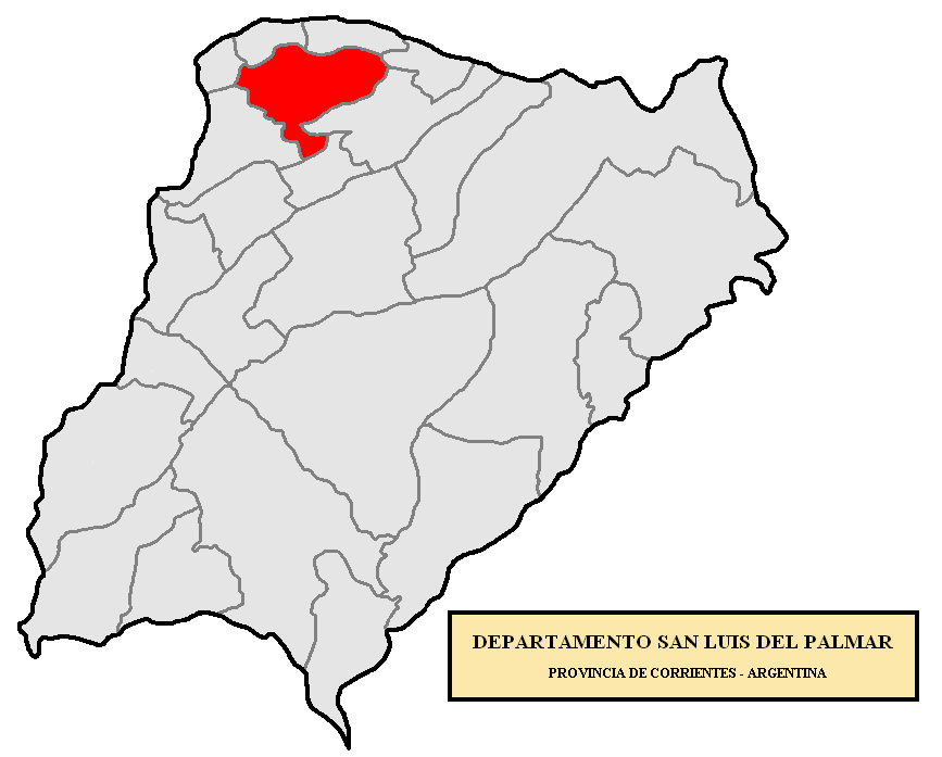 Ubicación de San Luis del Palmar Localización del Departamento San Luis del Palmar, en la provincia de Corrientes, Argentina.